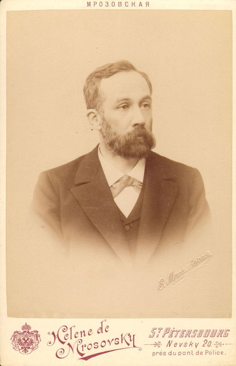 Eduardas Volteris in Saint Petersburg